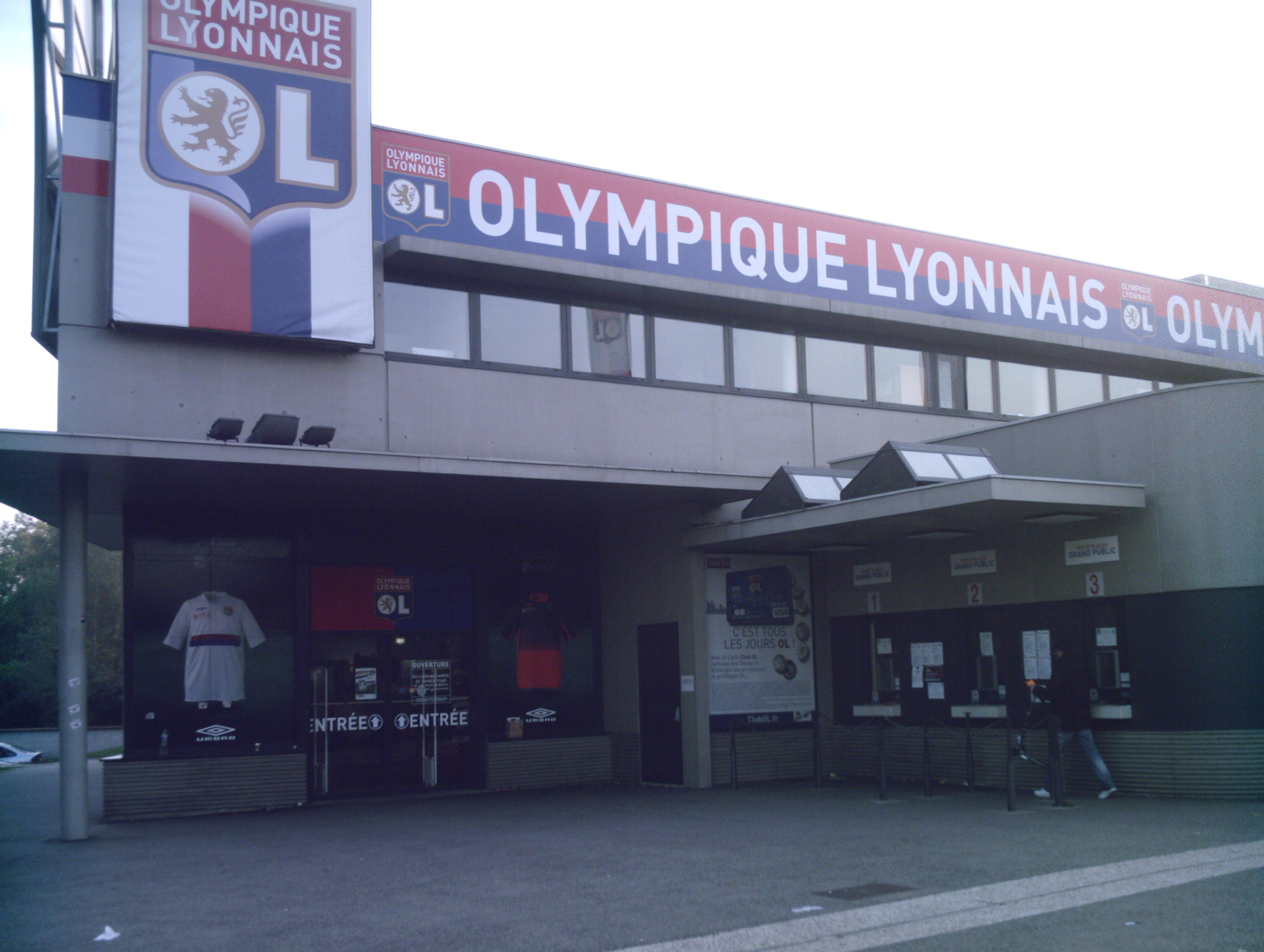 Boutique officielle et billetterie de l'Olympique lyonnais, à proximité du stade de Gerland. (Lyon, Rhône, FRANCE)